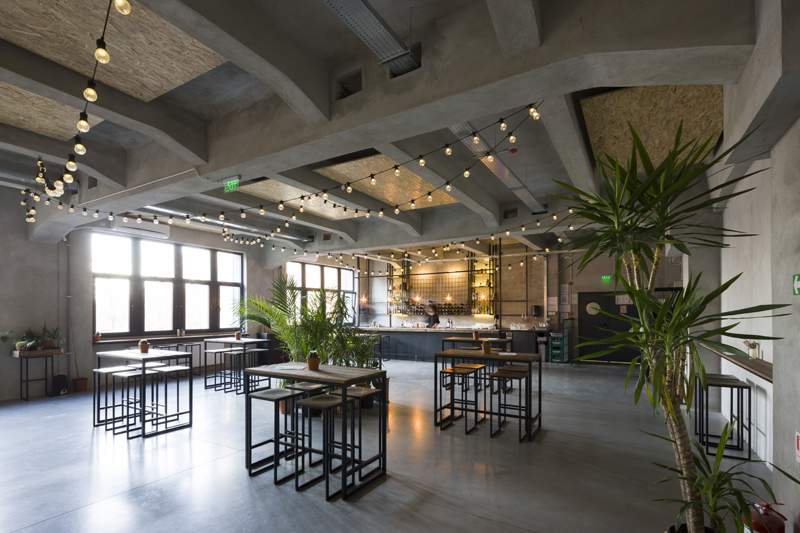 Fix Botanical Bar la et. 1